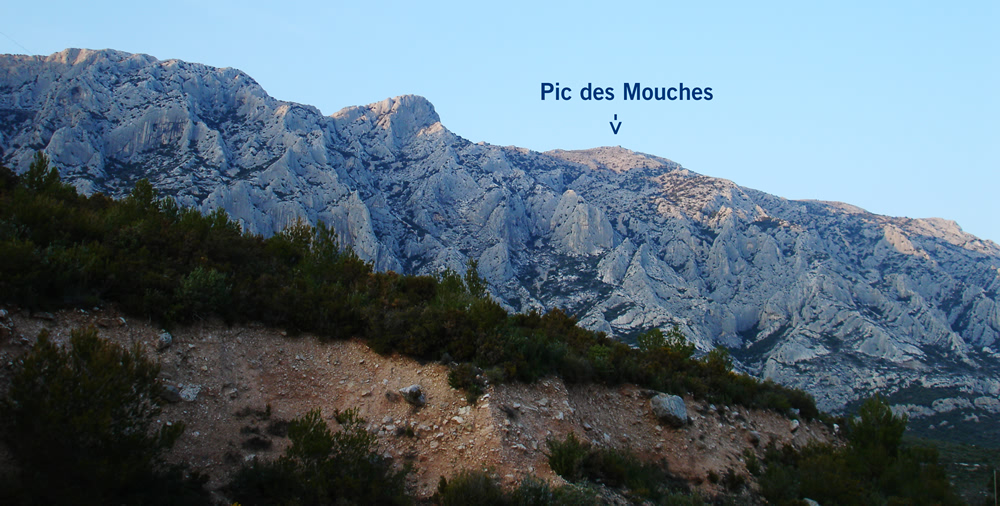 Montagne Sainte-Victoire depuis la face Sud : Pic des Mouches. Source: --Topf ✍ 09 avril 2005 à Puyloubier Description technique: Photographie prise avec un appareil numérique Sony Cybershot DSC-P150 7,2 MPx. Licence: GNU